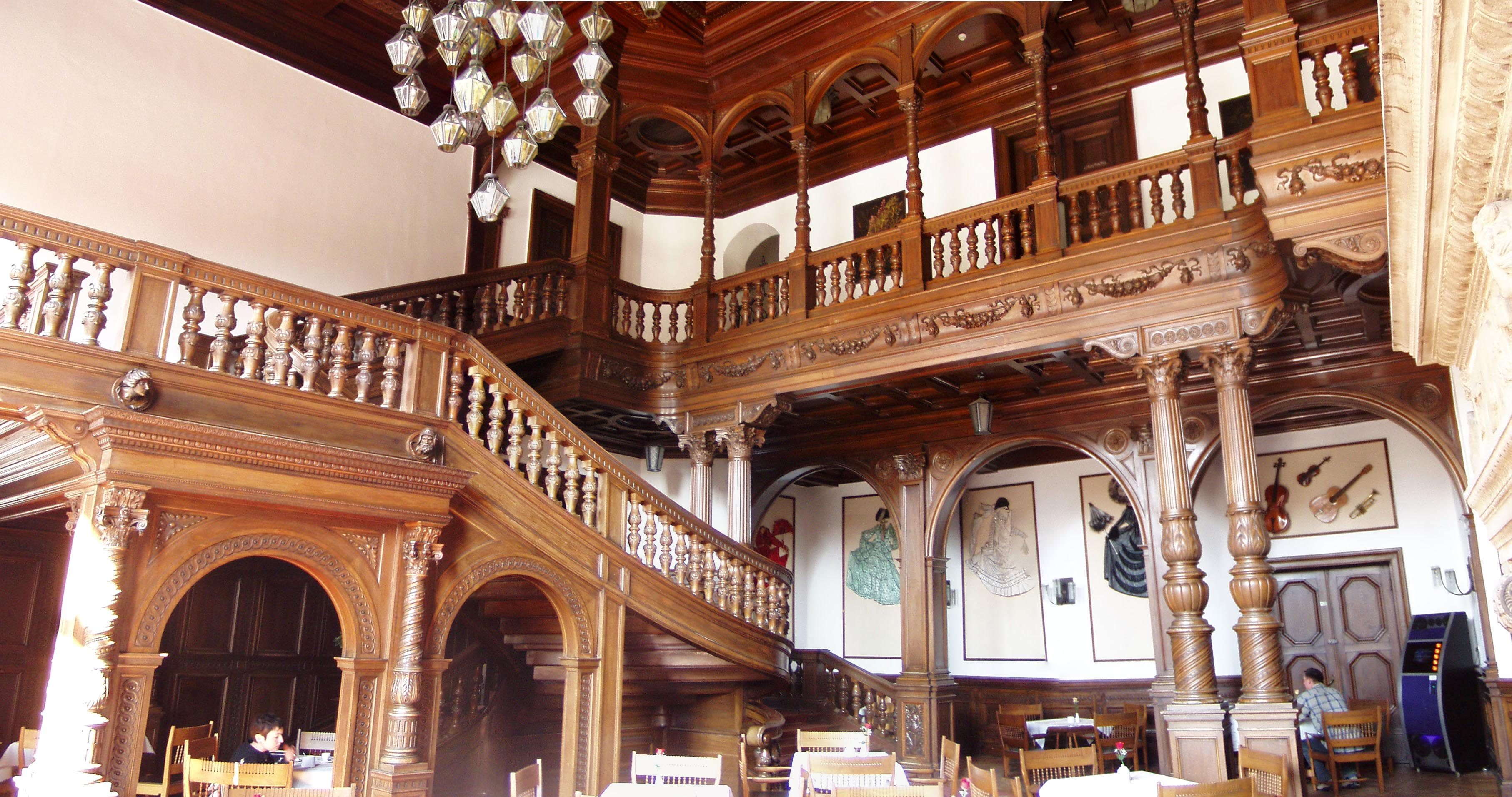 Moszna - wnetrze zamku